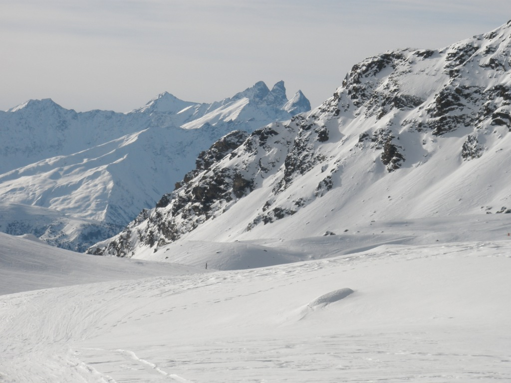 מסלולים מושלגים באתר הסקי ואל טורנס